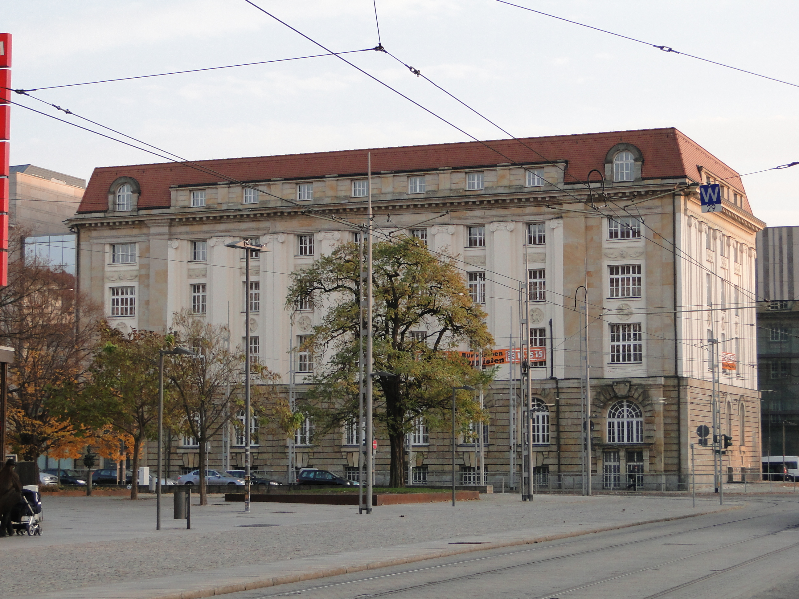 Gebäude der Dresdner Bank am Dr.-Külz-Ring